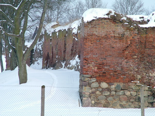 Zamek Kiszewski - mury obronne zamku, XIV